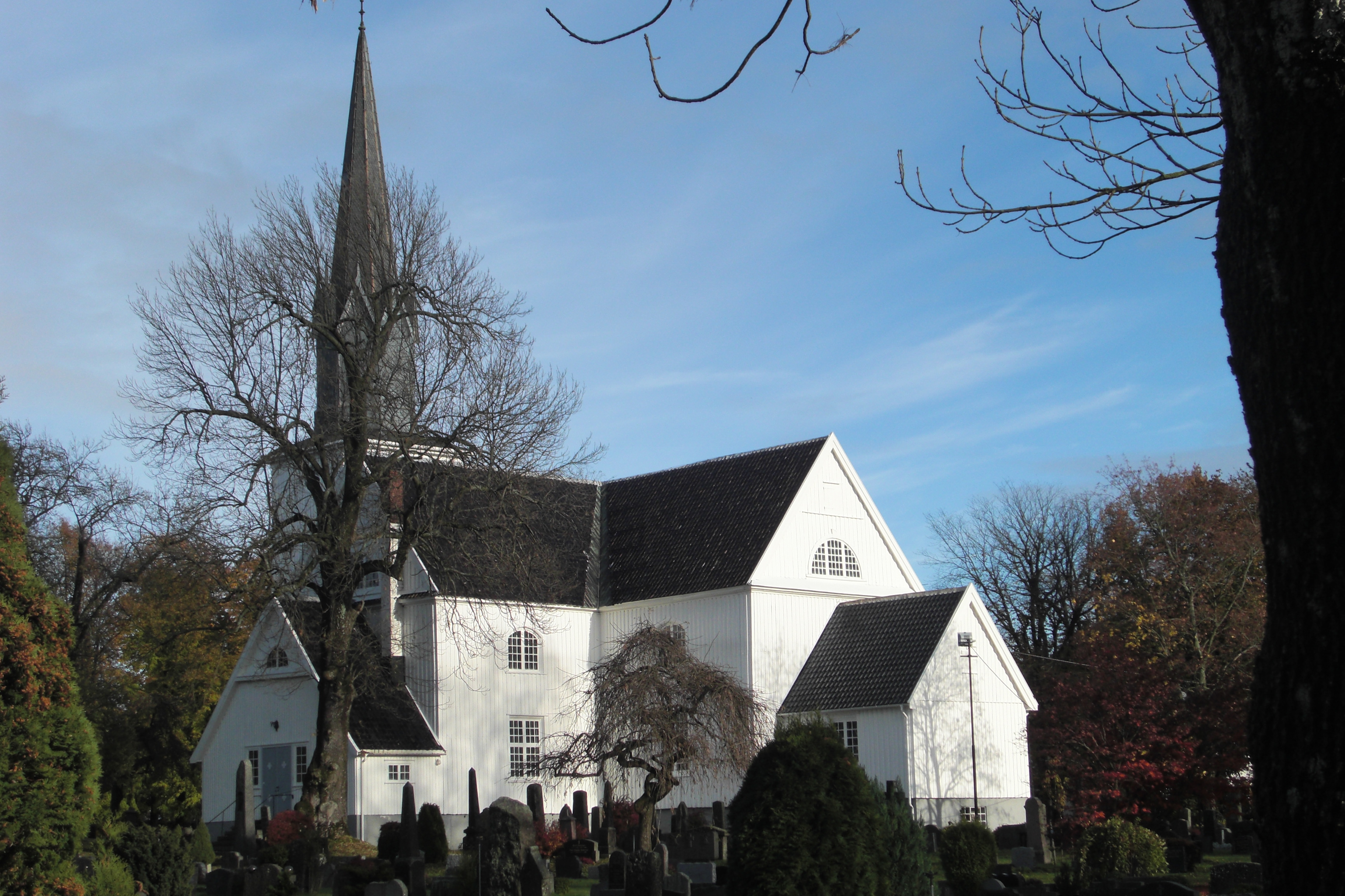 Sandar kirke i Sandefjord kommune, Vestfold